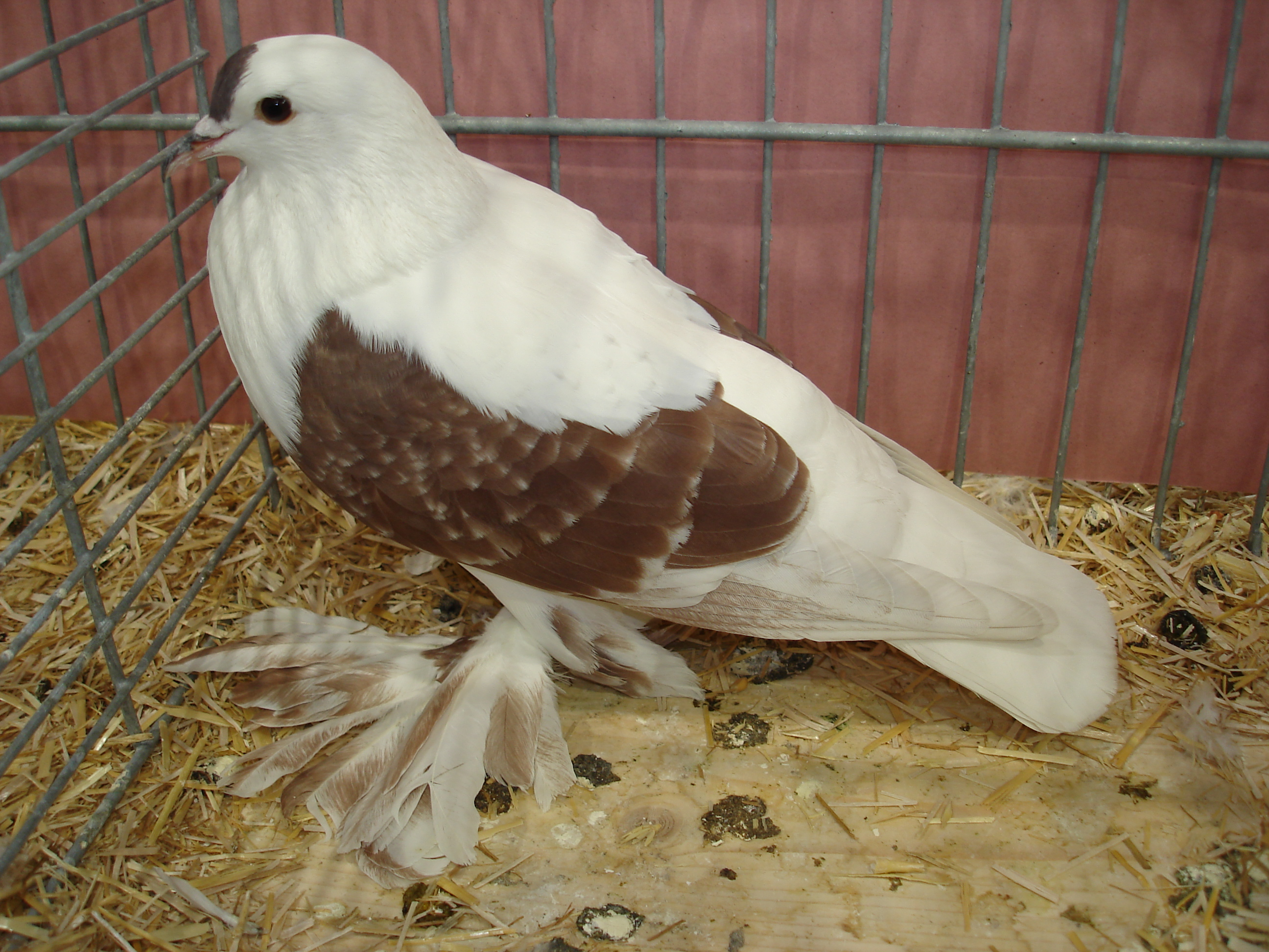 Zdjęcie saksońskiej czajki (ryżowej)